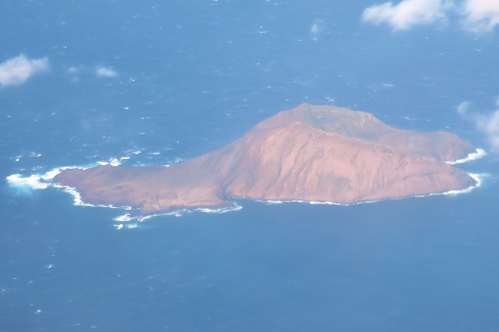 Montana Clara, Insel der Kanarischen Inseln